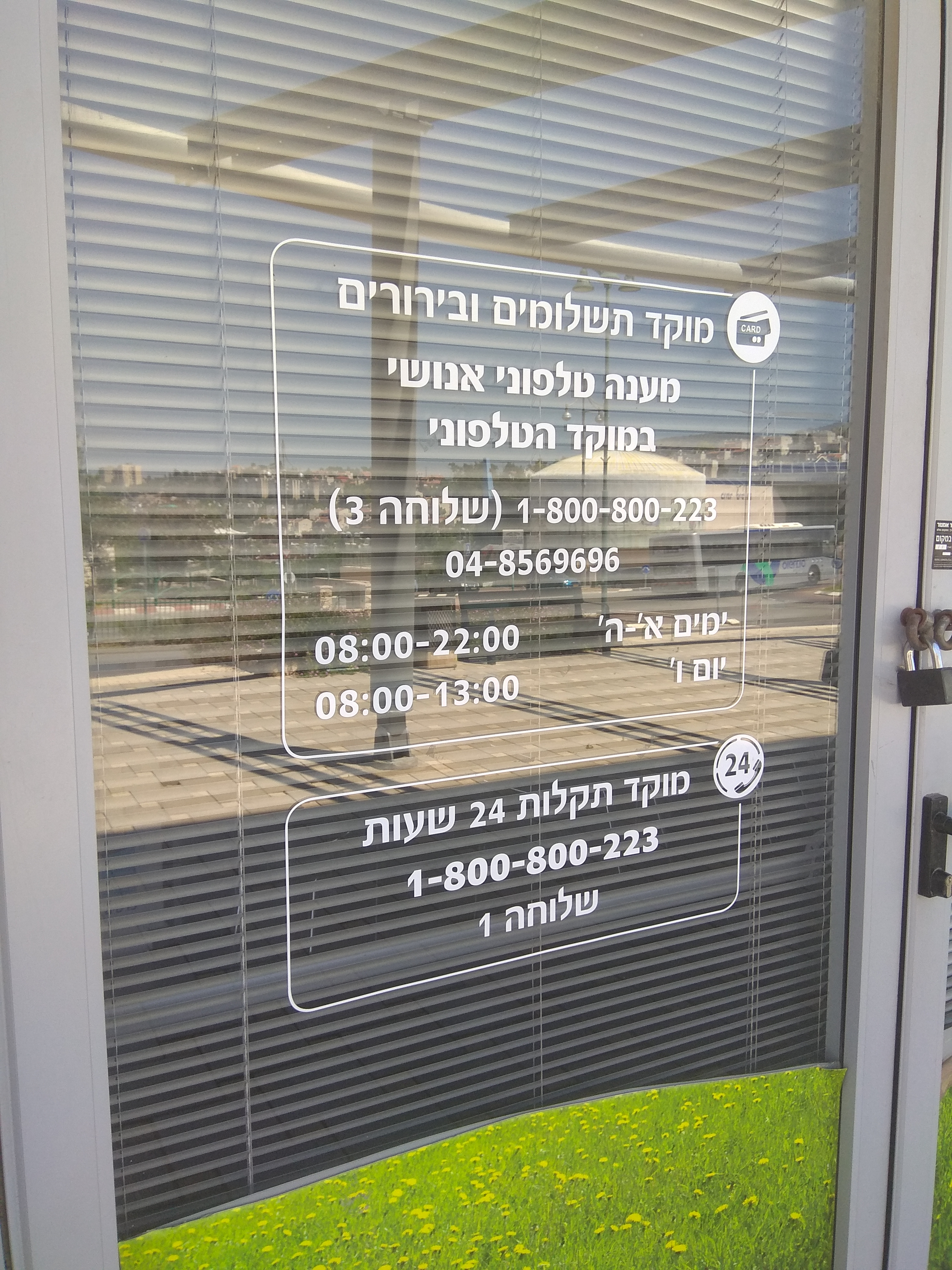 מוקד טלפוני העובד באופן מקוצר בשישי